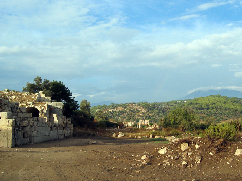 Patara